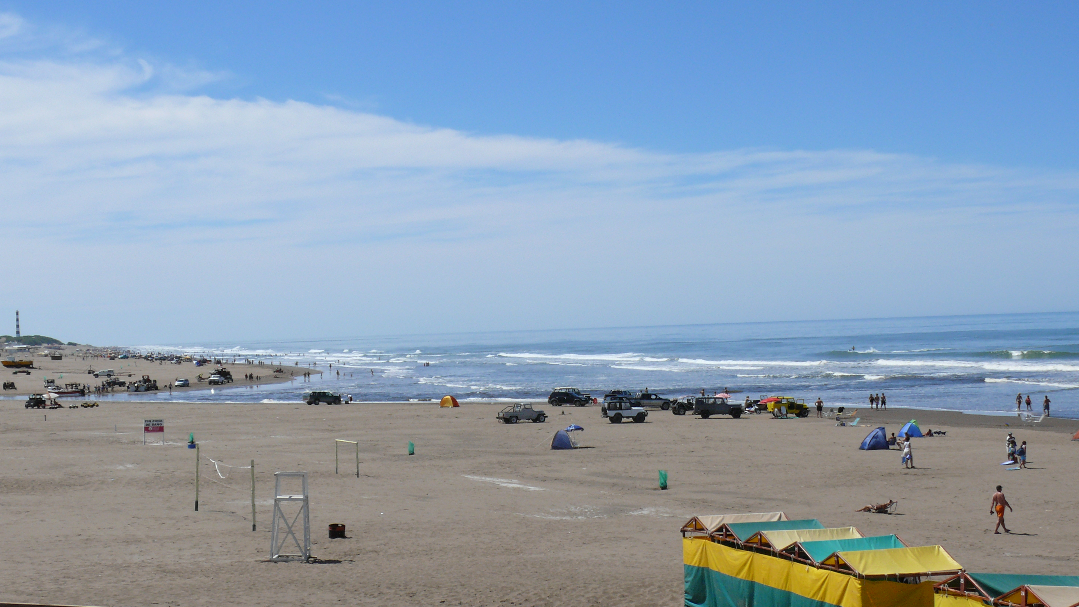 Claromeco desde Dunamar